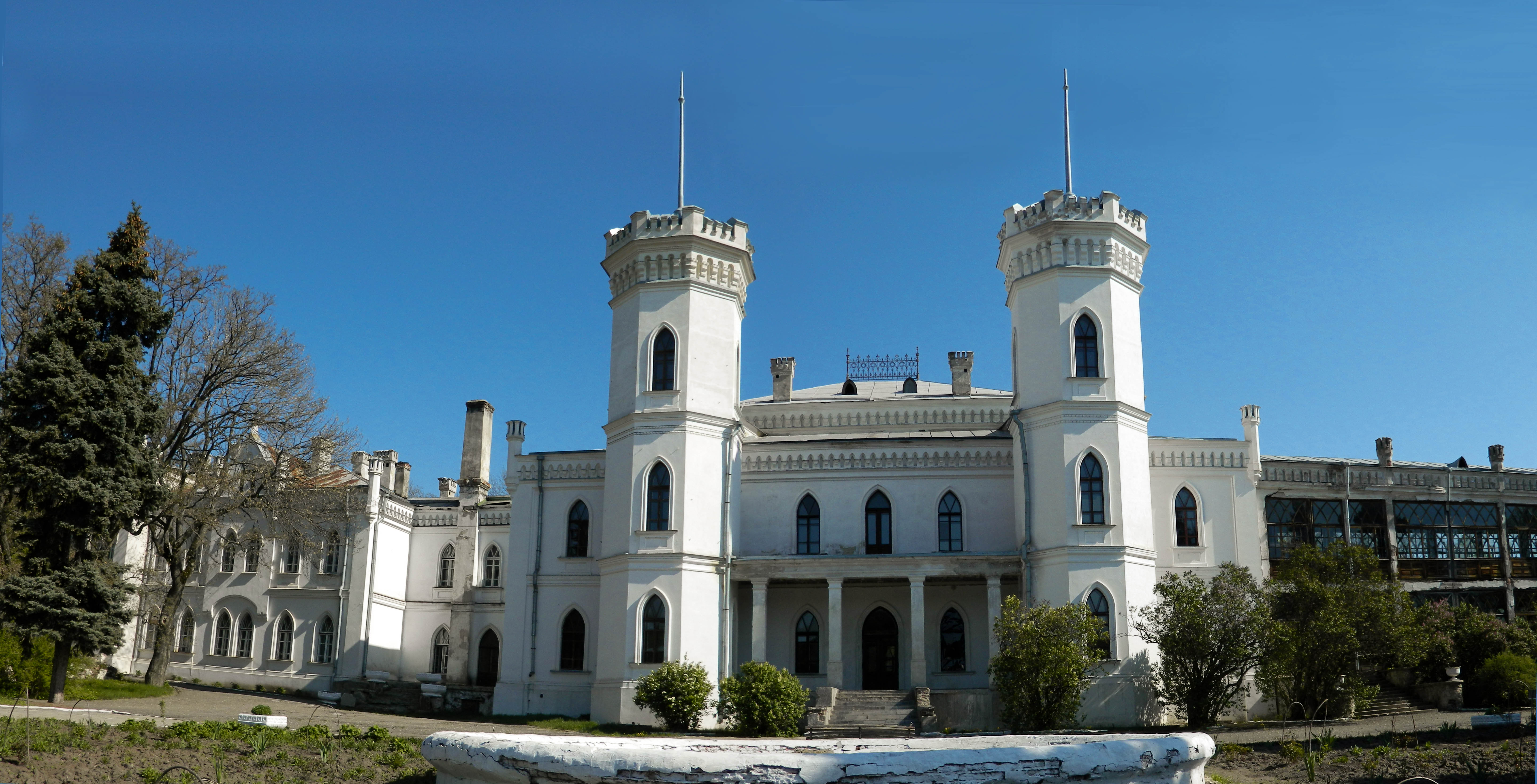 Парк-пам'ятка садово-паркового мистецтва - територія тубсанаторію «Шарівка» у смт. Шарівка, Богодухівський район, Харківська область